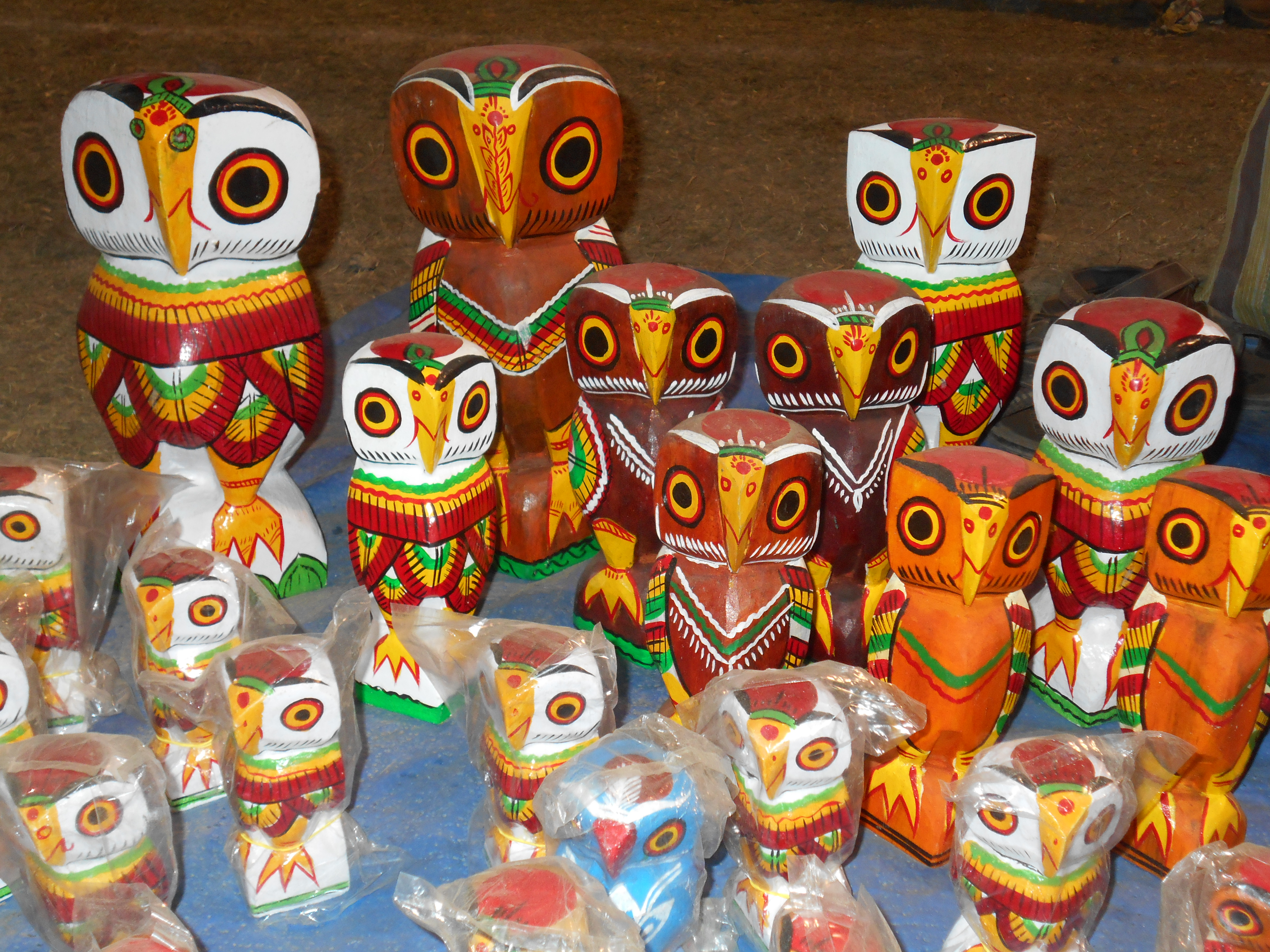 নতুনগ্রামের কাঠের পেঁচা